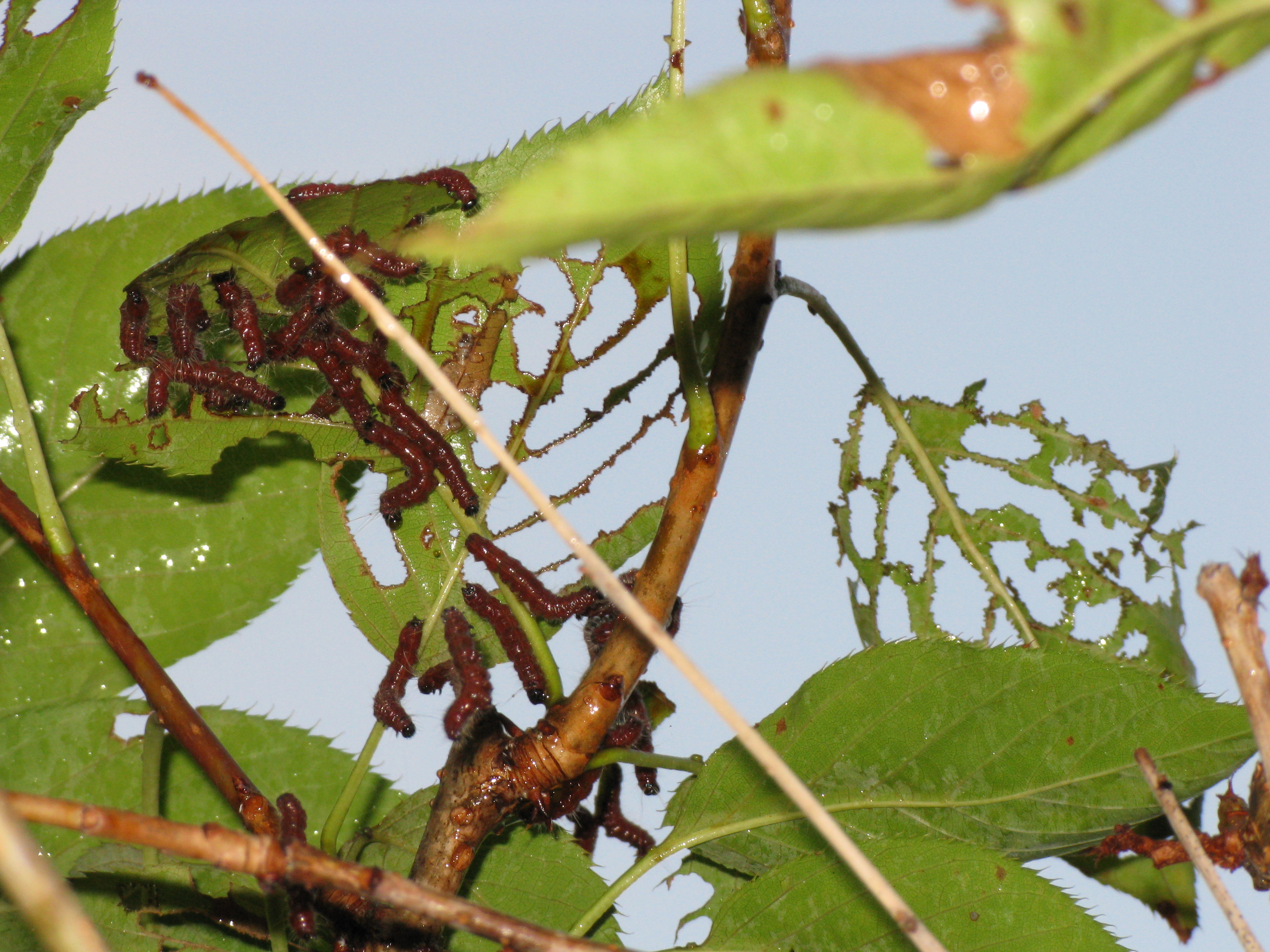 Scientific name Phalera flavescens